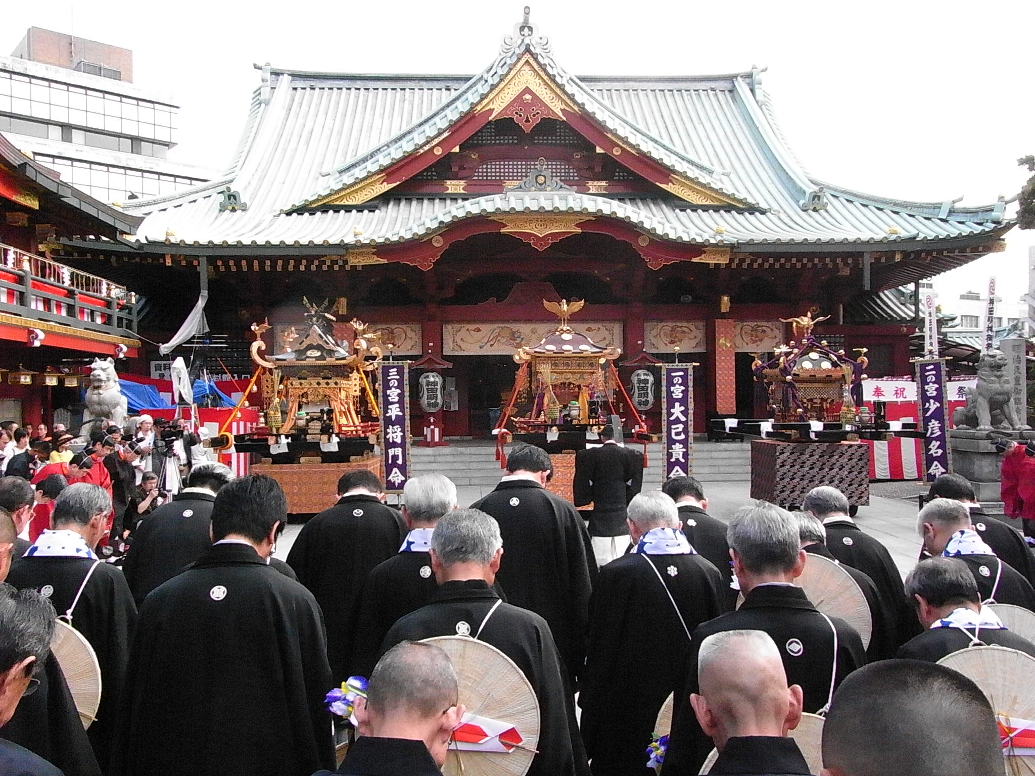 神田明神 神田祭